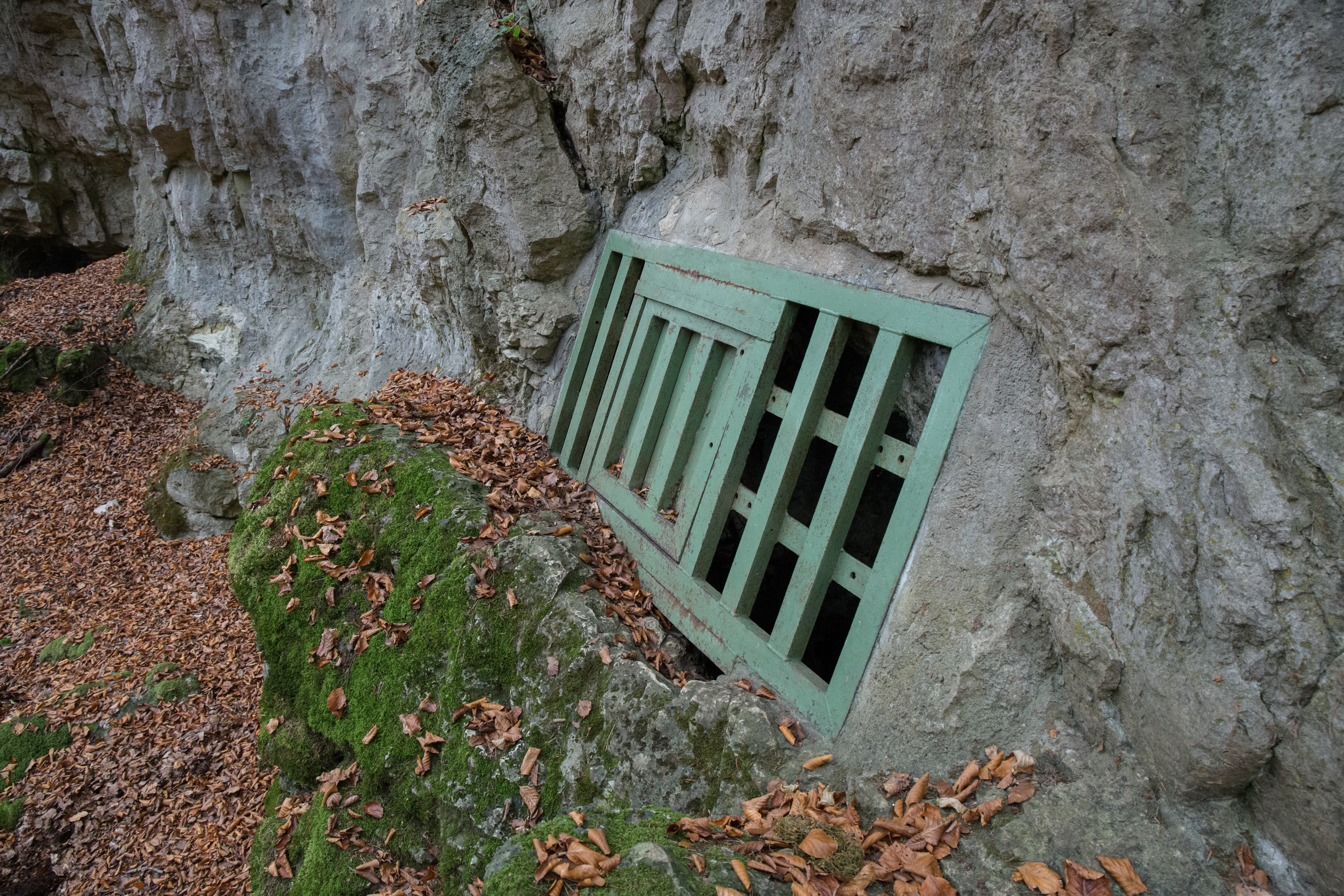 Vergittertes Höhlenportal in der Felswand